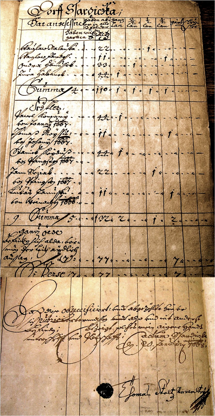 Soupis usedlostí v Šardičkách k 20.1.1668 jako součást panství Nové Zámky u Nesovic.